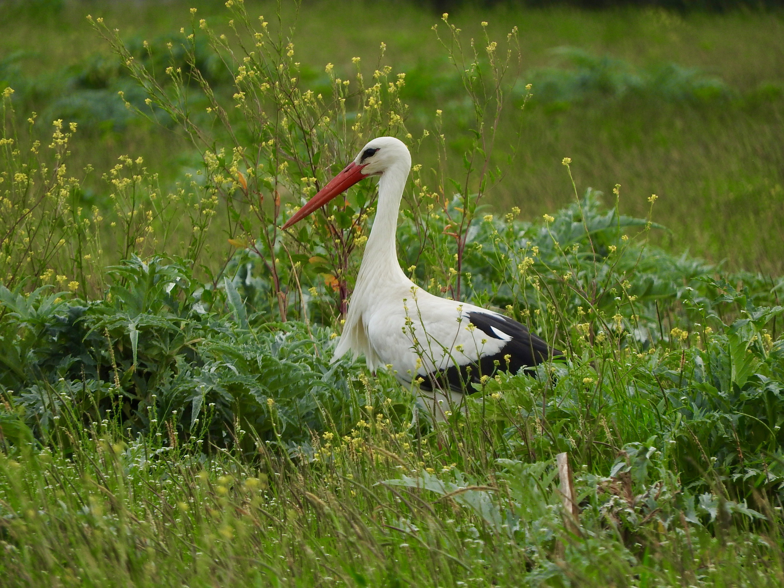 Licenza